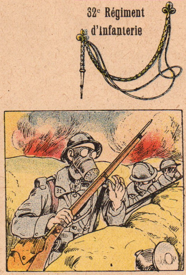 Extrait de : Pierre Hellin, Le régiment de papa, Le parfait notaire, 32e régiment d'infanterie, n° 100, Albin Michel, Paris, 1919 (bande dessinée : l'épopée du notaire Panonceau affecté au 32° RI pour la durée de la guerre). Illustration de la journée du 26 avril 1975 où le régiment est gazé. (Document personnel)